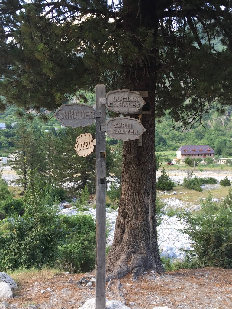 Drejtim Rruge